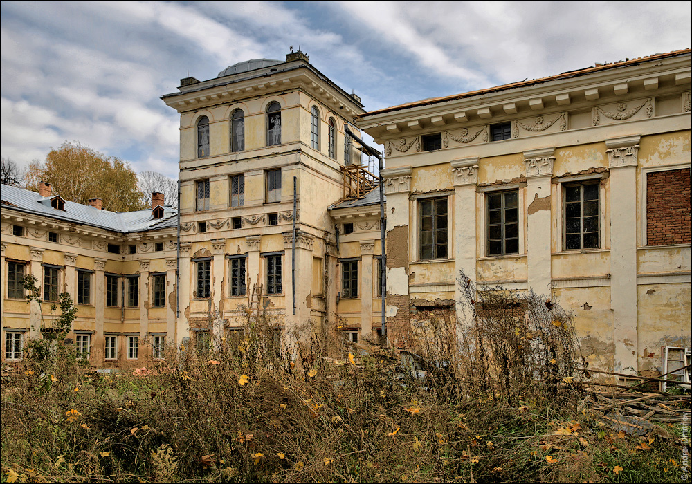 Жыліцкі палац